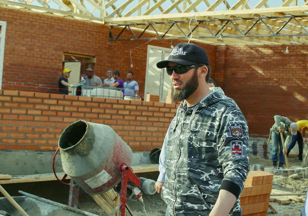 Чеченская Республика, Шатойский район, село Гуш-Корт This file, which was originally posted to was reviewed on 2 June 2017 by the administrator or reviewer Daphne Lantier, who confirmed that it was available there under the stated license on that date.